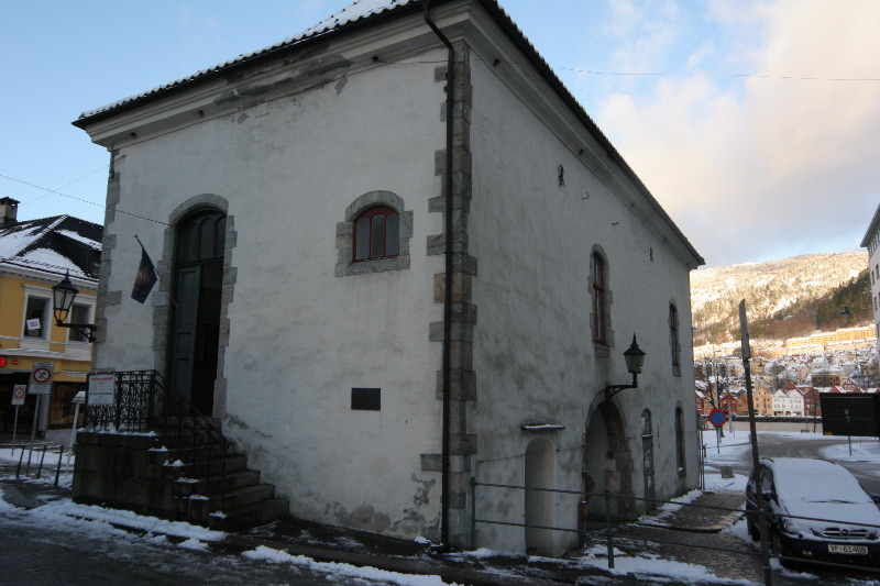 Murhvelvingen, Bergen. foto Nina Aldin Thune